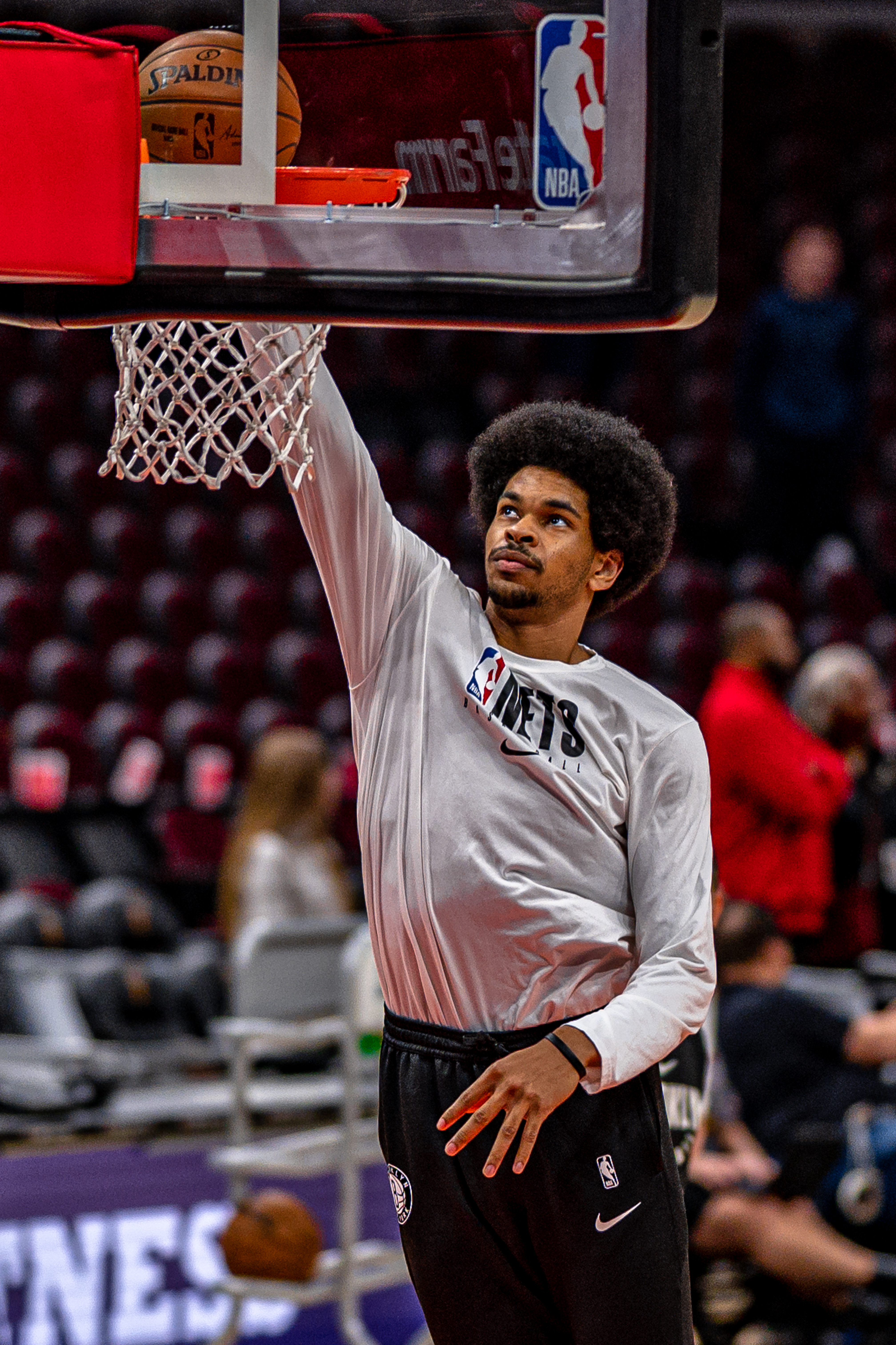 Cleveland Cavaliers vs. Brooklyn Nets